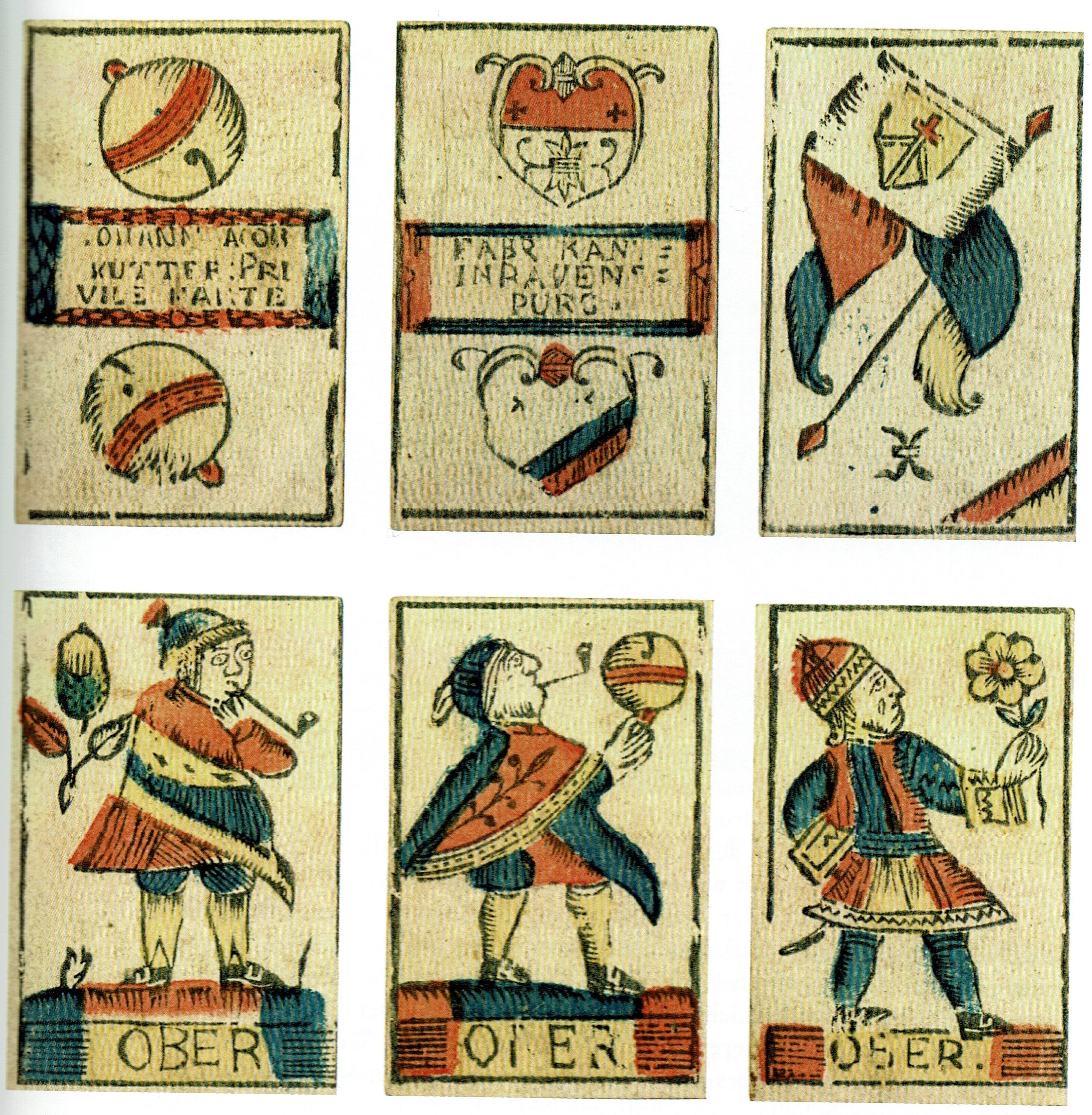 Ravensburger Jass-Karten. Museen der Stadt Kempten